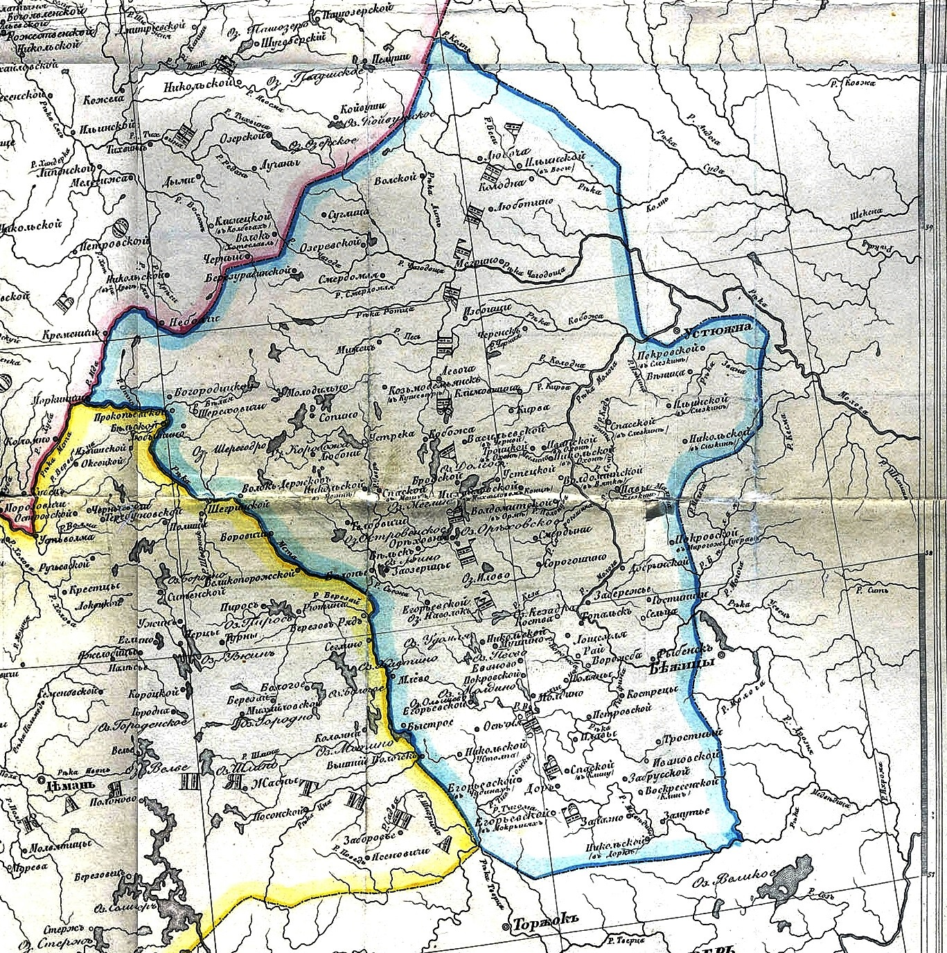 Бежецкая пятина (или Бежецкий ряд) — восточная пятина Новгородской земли (XVI век)